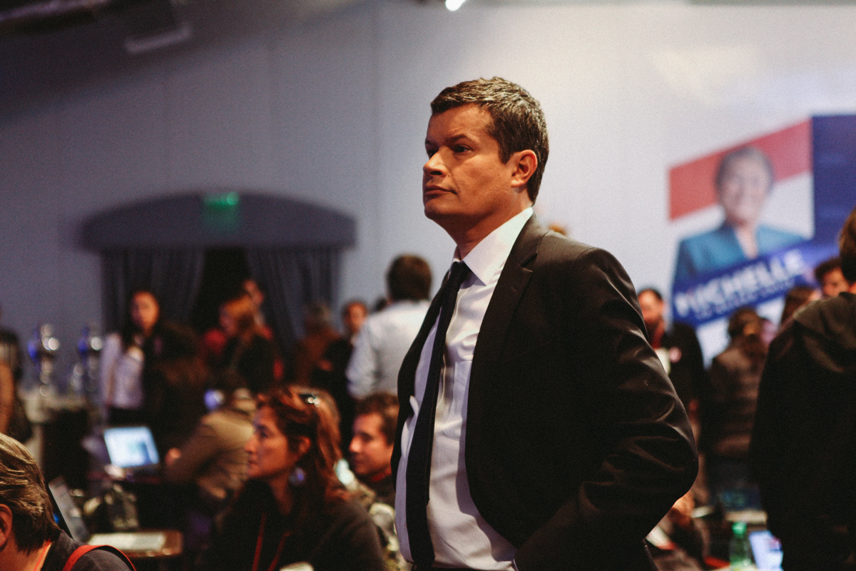 Felipe Bianchi, periodista, espera en Hotel San Francisco durante la elección primaria de 2013.